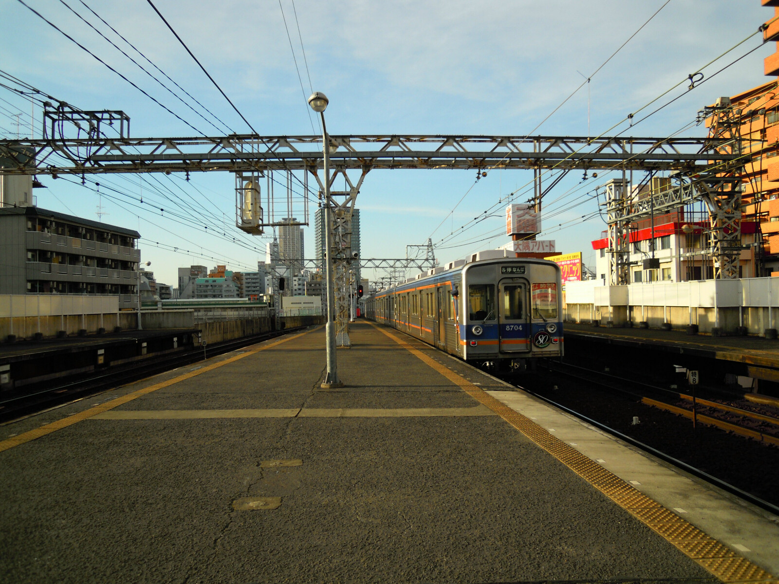 Nankai Shinimamiya station platform